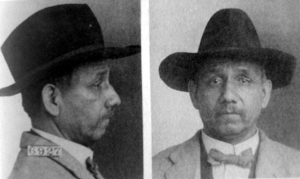 Jesús María Rangel, militante del Partido Liberal Mexicano preso por violar las Leyes de Neutralidad estadounidense